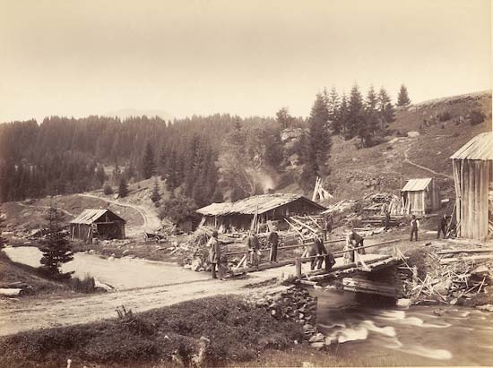 Mlýn na řece Řezná u Bavorské Železné Rudy (Bayerisch Eisenstein)